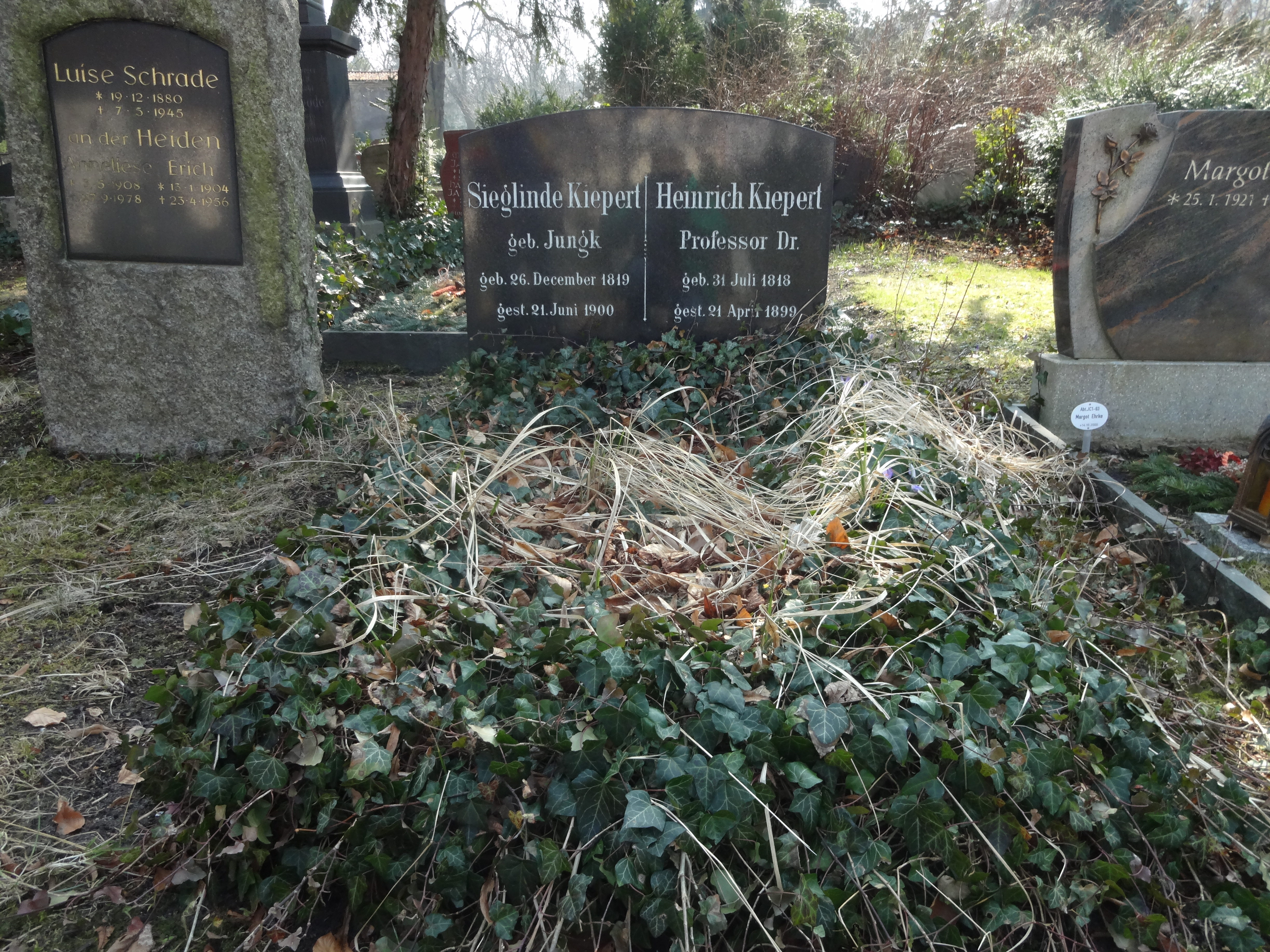 ehemaliges Ehrengrab von Prof. Heinrich Kiepert auf dem Alten St.-Jacobi-Friedhof in Berlin